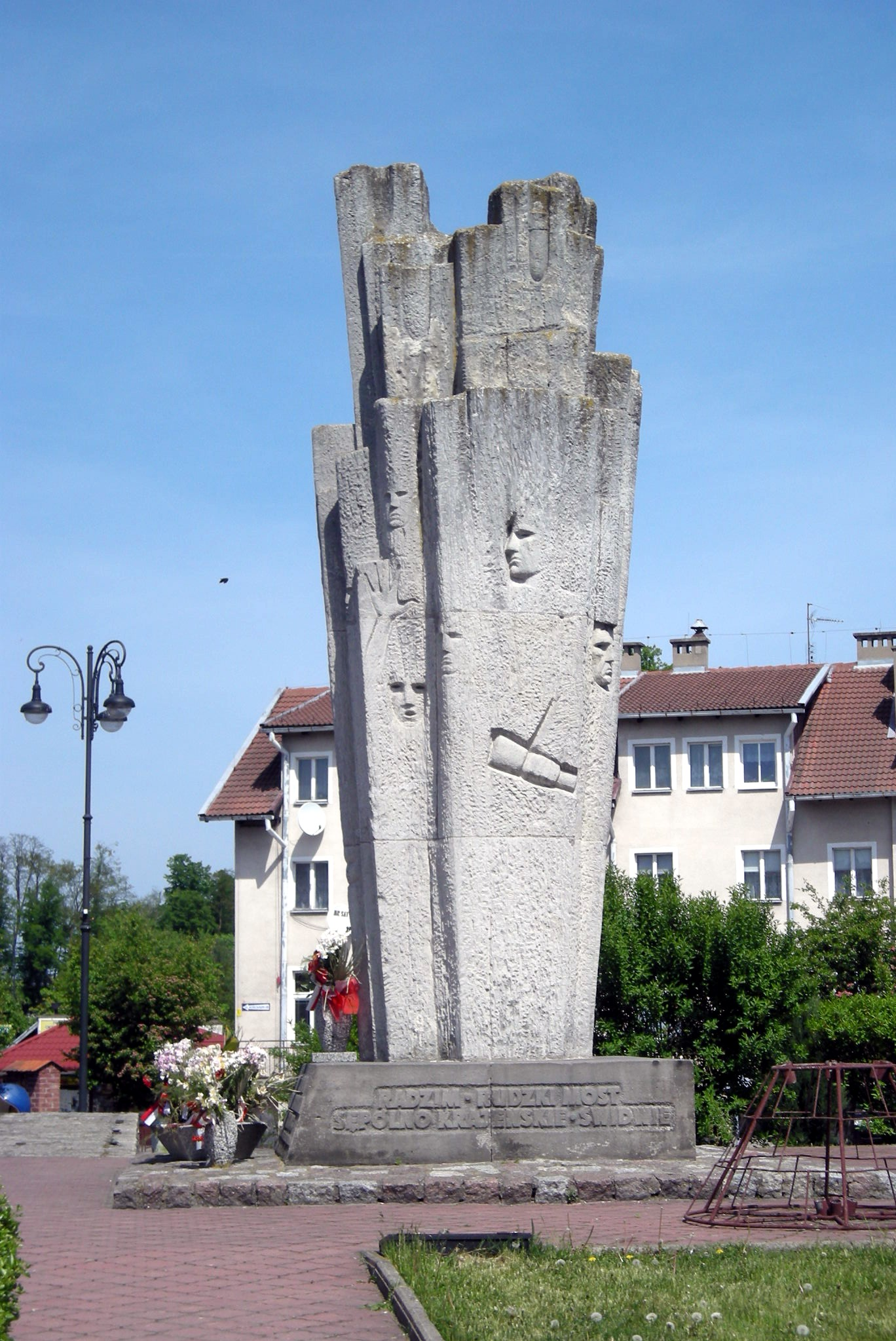 Sępólno Krajeńskie - pomnik pamięci poległych w walkach o niepodległość miasta